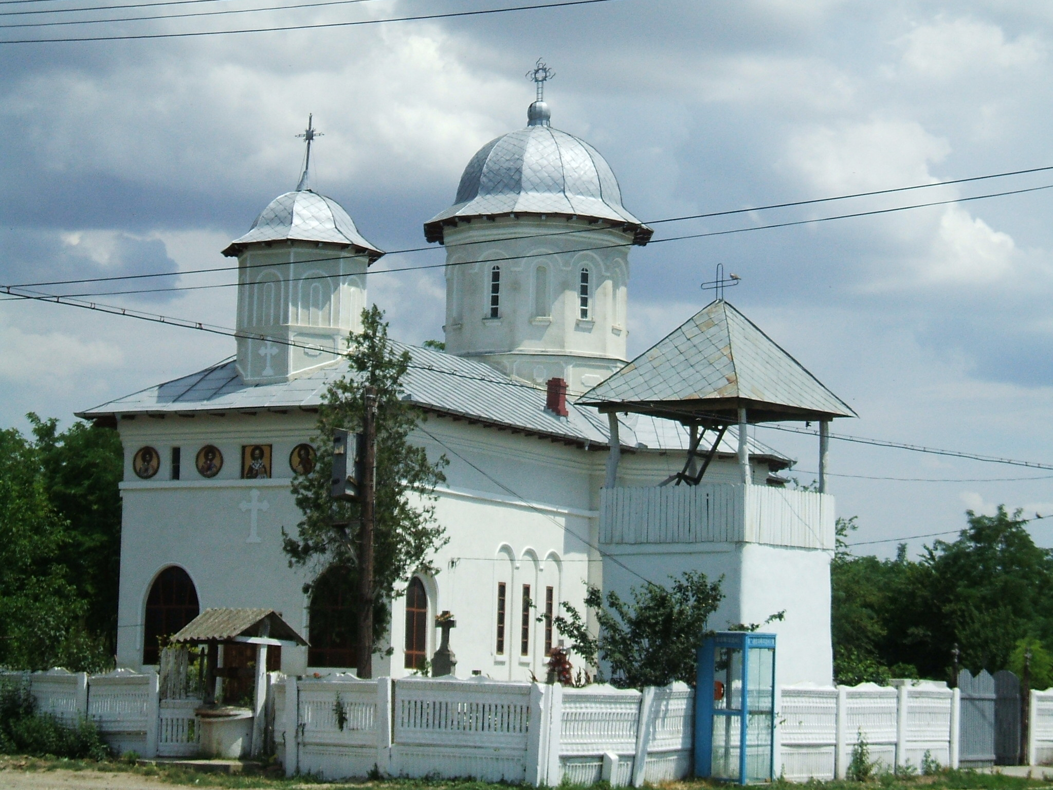 Biserica "Sfantul Ierarh Nicolae" din Rasa, construita intre 1936-1937 pe acelasi amplasament cu o biserica mai veche, din secolul XIX, de la care a preluat catapeteasma.